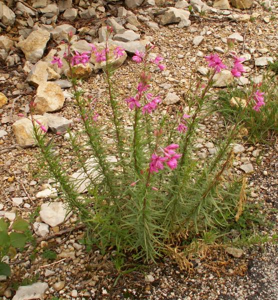 Epilobium dodonaei, Foncine, Jura, France